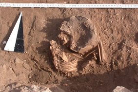 Säuglingbestattung in Shir